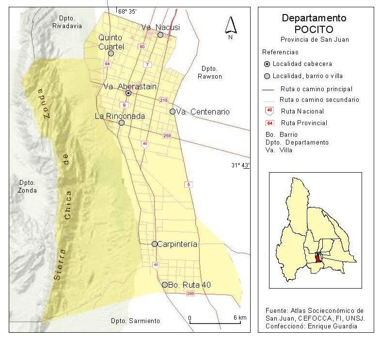 Mapa del Departamento Pocito, provincia de San Juan, Argentina